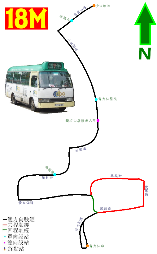 中文（香港）: 九龍專線小巴18M線的走線圖